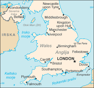 Irsko morje.